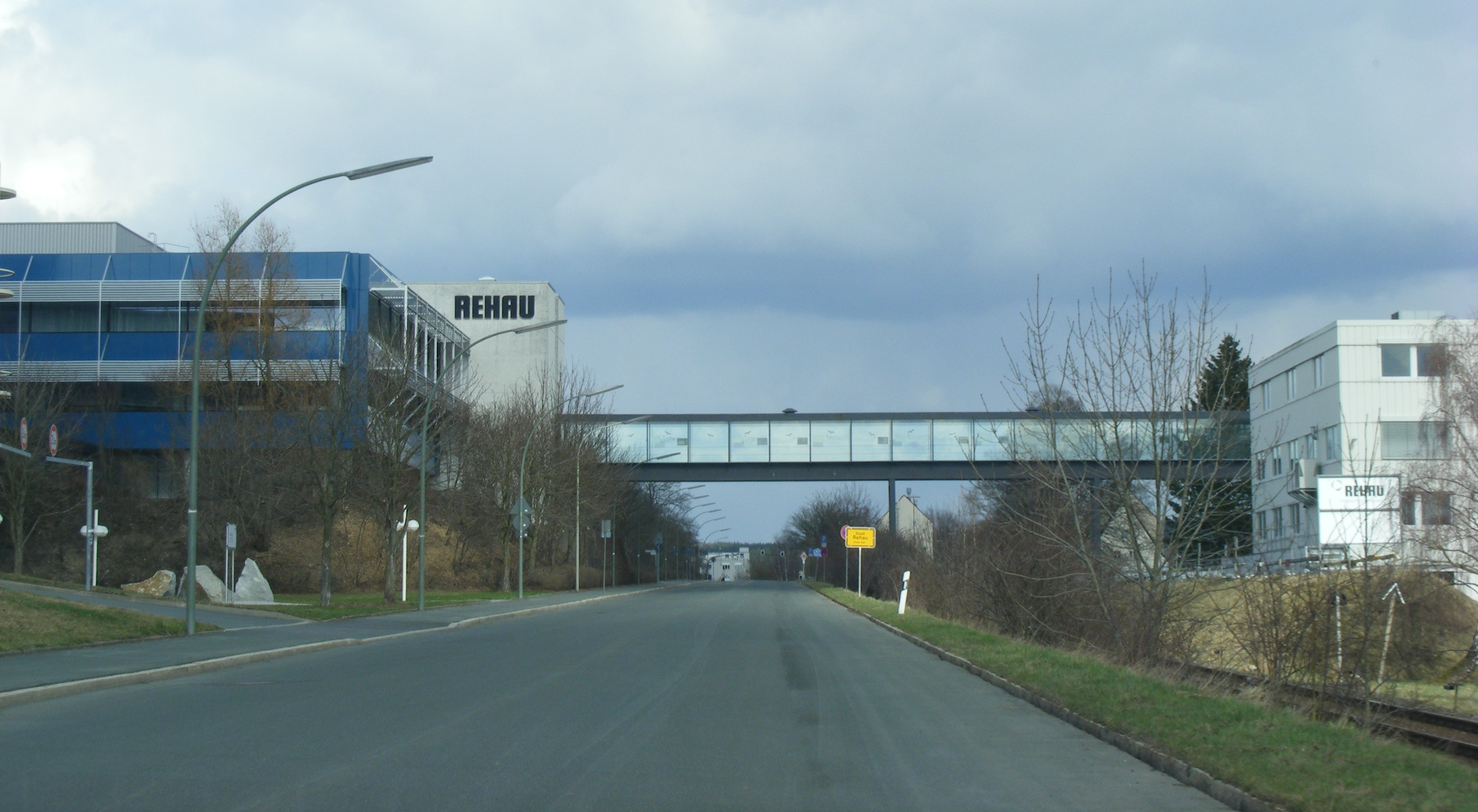 REHAU Hauptverwaltung in Rehau